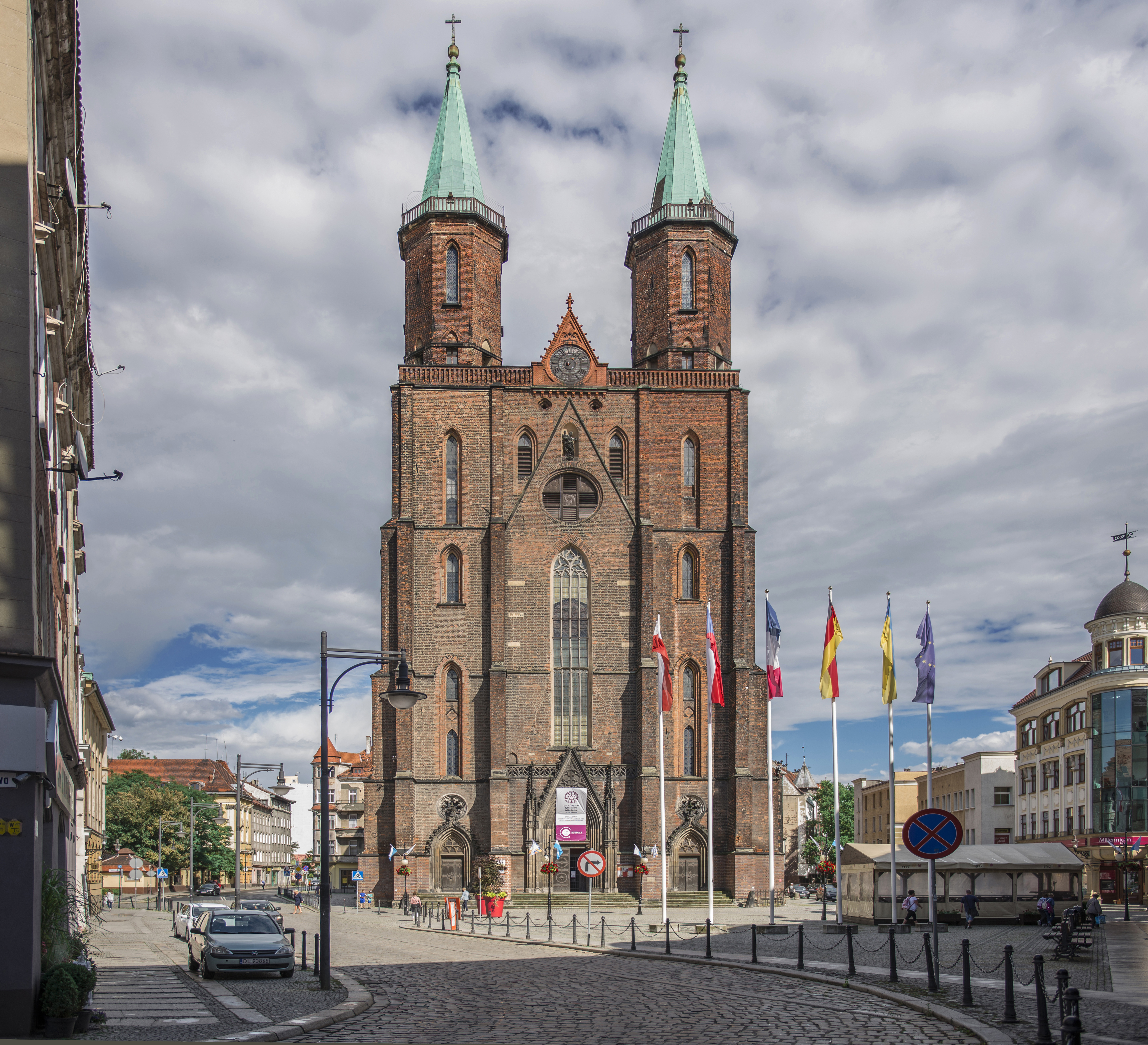 Kościół Marii Panny